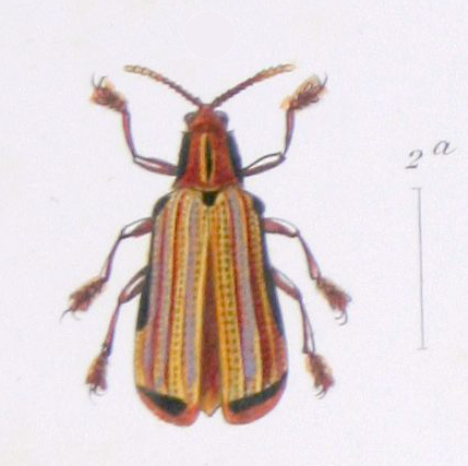 Acentroptera Lacordairei